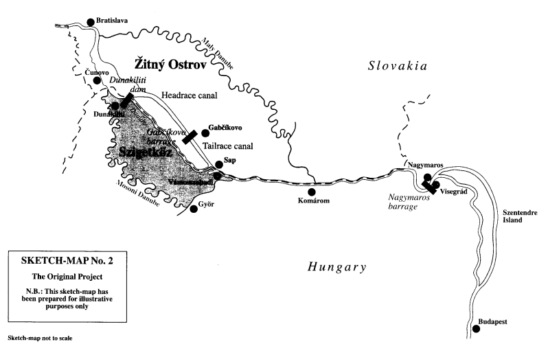 ガブチコボ・ナジュマロシュ計画事件ICJ判決でICJが示した、1977年のチェコ・スロバキア、ハンガリー間の条約による当初の計画